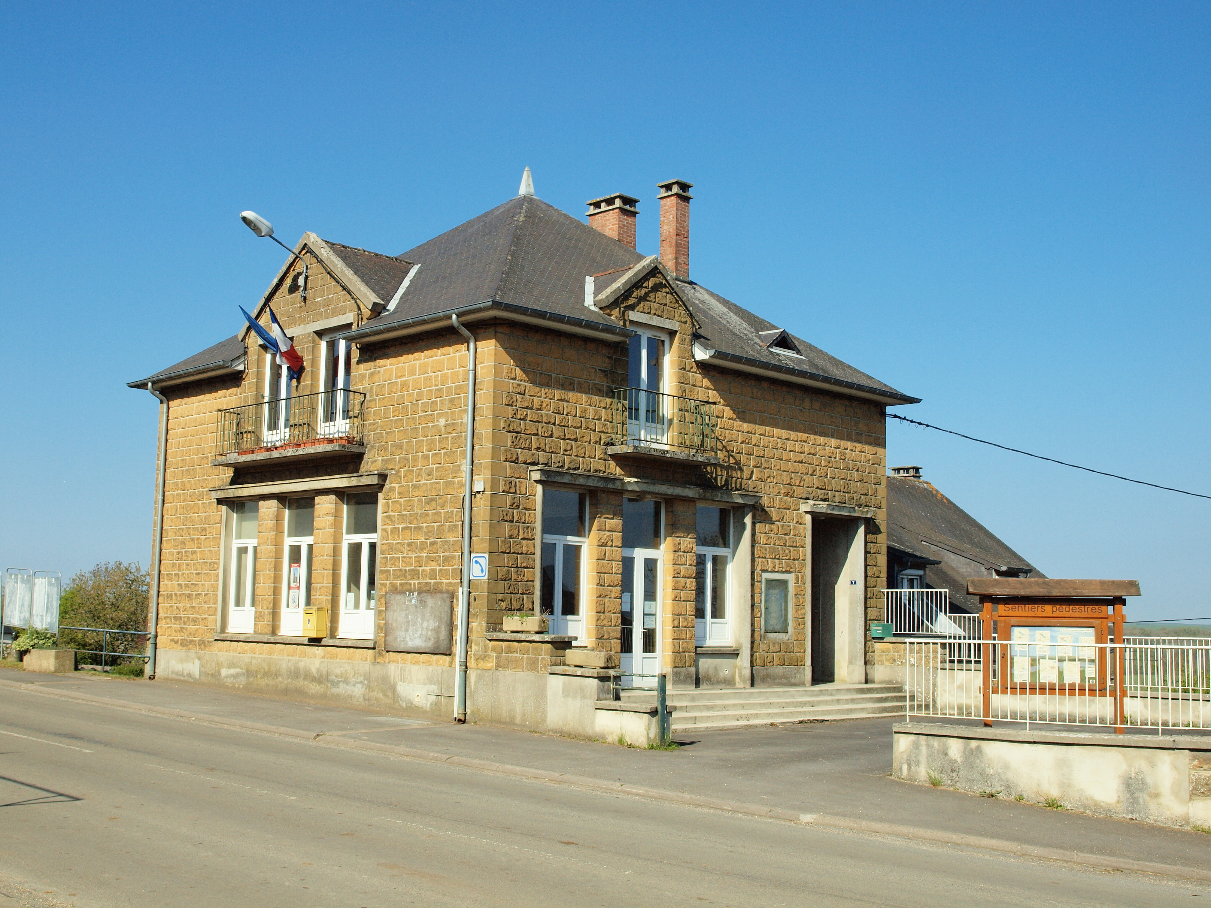 Tannay (Ardennes, France)